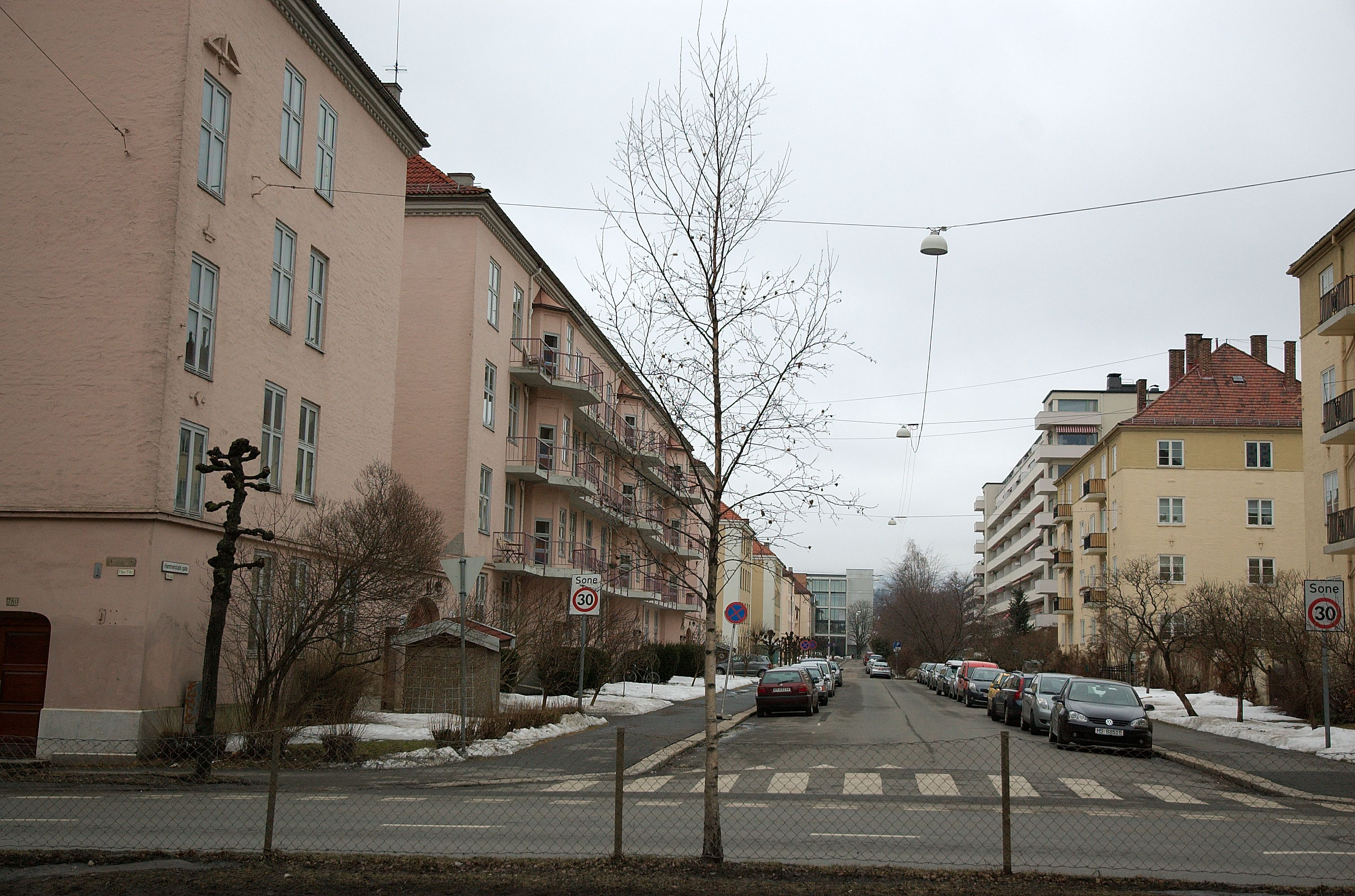 Hammerstads gate sett fra Kirkeveien